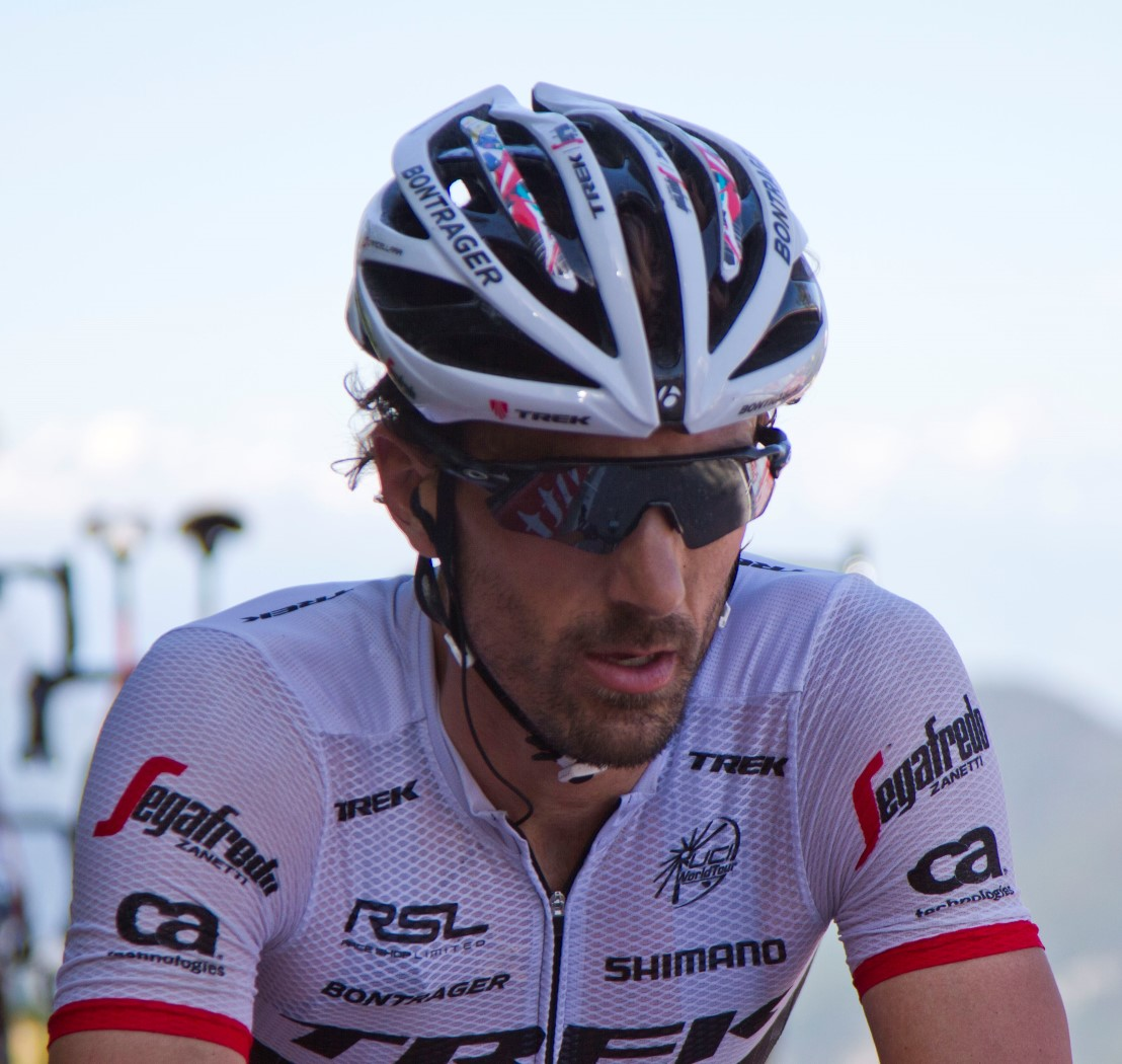 340 cancellara